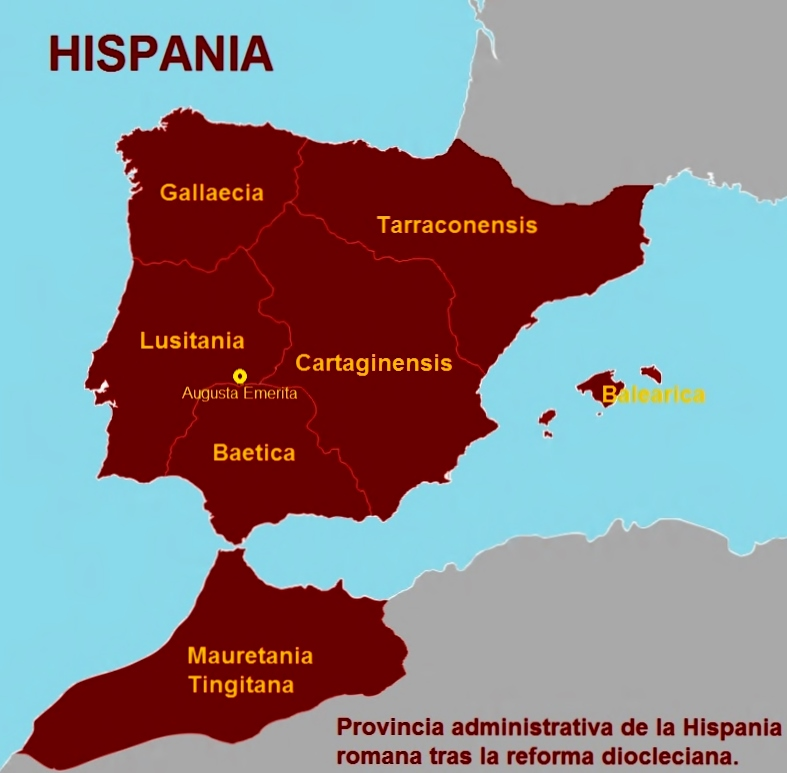 División de Hispania tras la reforma de Diocleciano en el año 298.